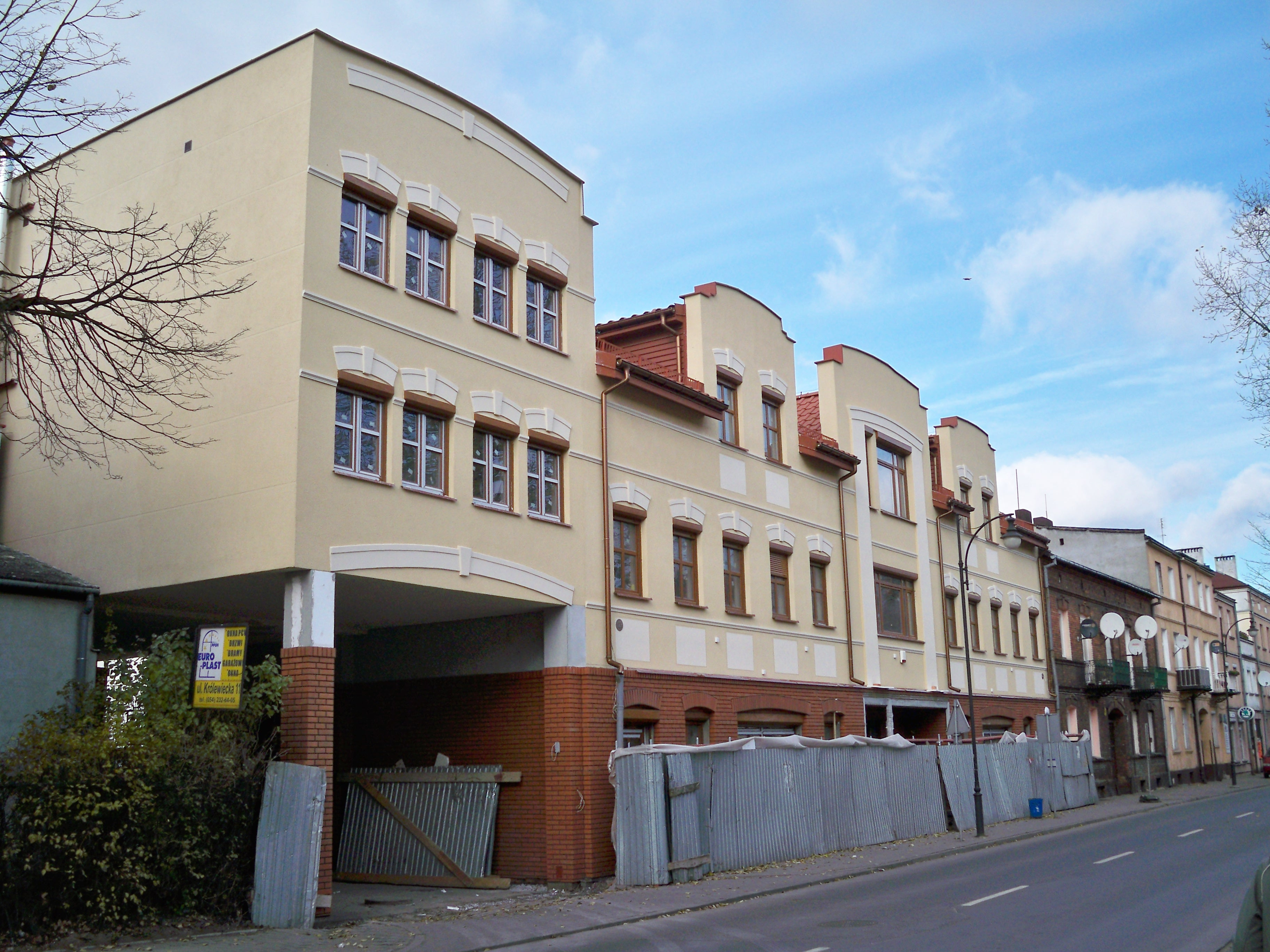 Budowa budynku przy ul. Królewieckiej 30 (2009 r.)